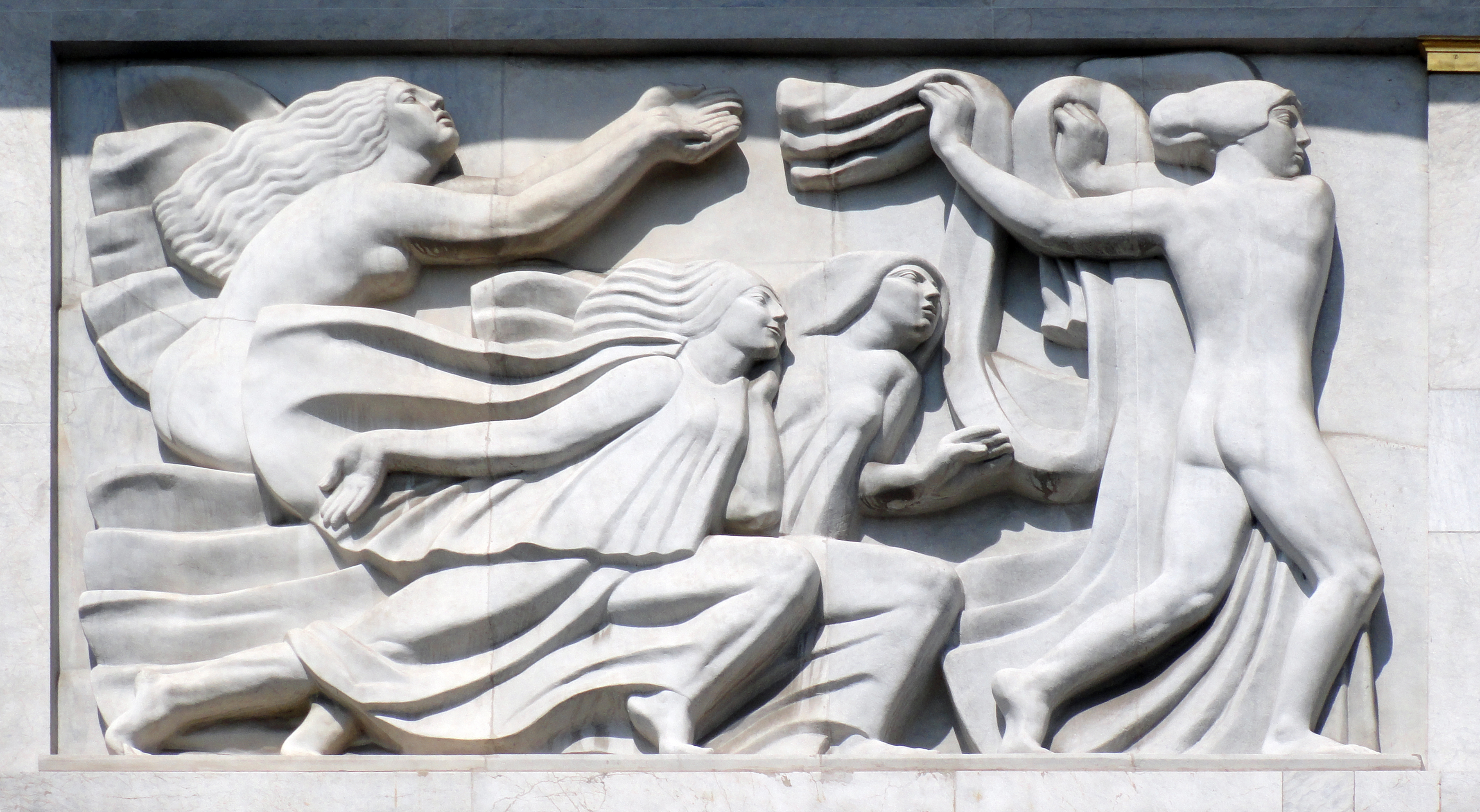 Antoine Bourdelle, 1910-12, Apollon et sa méditation entourée des 9 muses (The Meditation of Apollon and the Muses), bas-relief, Théâtre des Champs Elysées